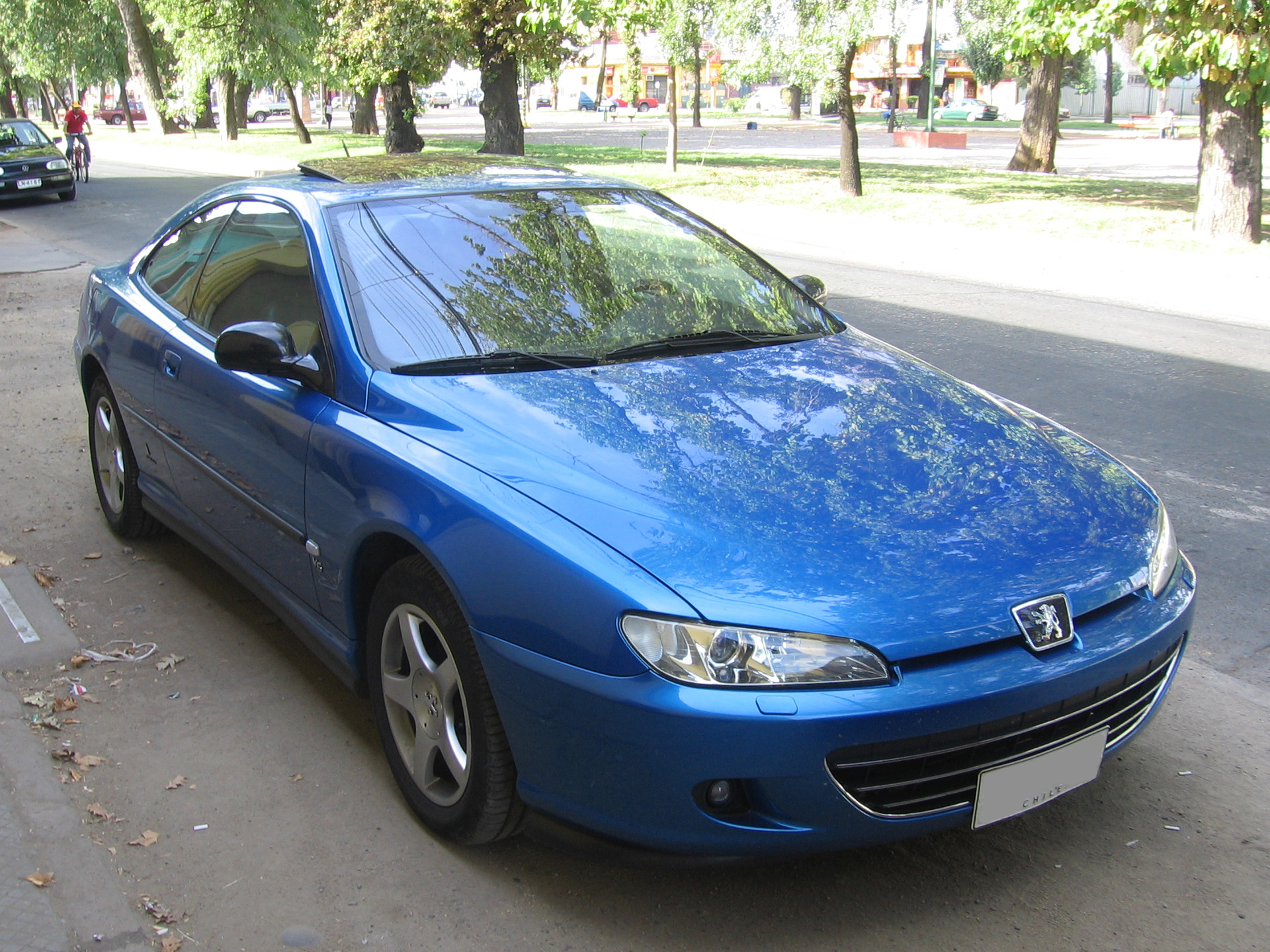 Peugeot 406 Coupe V6 2005